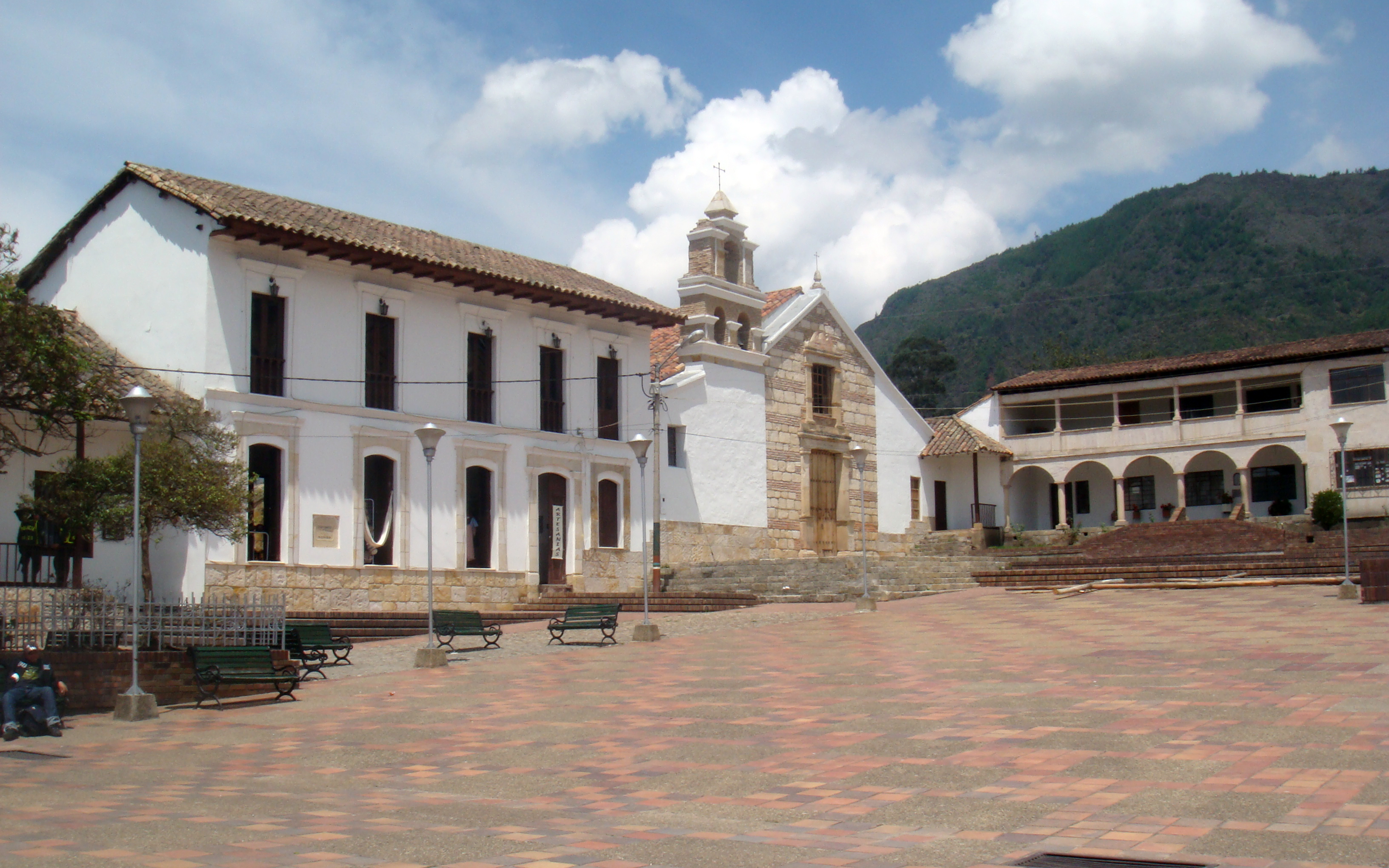 Plaza Sesquile